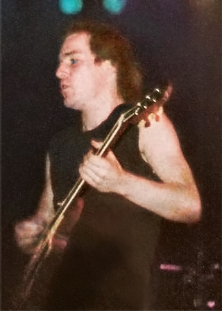 Klaus Heuser with BAP in Iserlohn (1984)